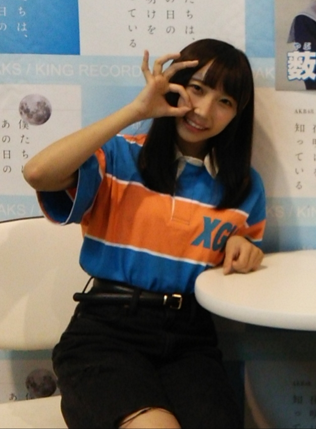 AKB48 9thアルバム「僕たちは、あの日の夜明けを知っている」 劇場盤発売記念 大写真会